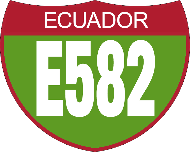 Disco de Identificación Ruta E582